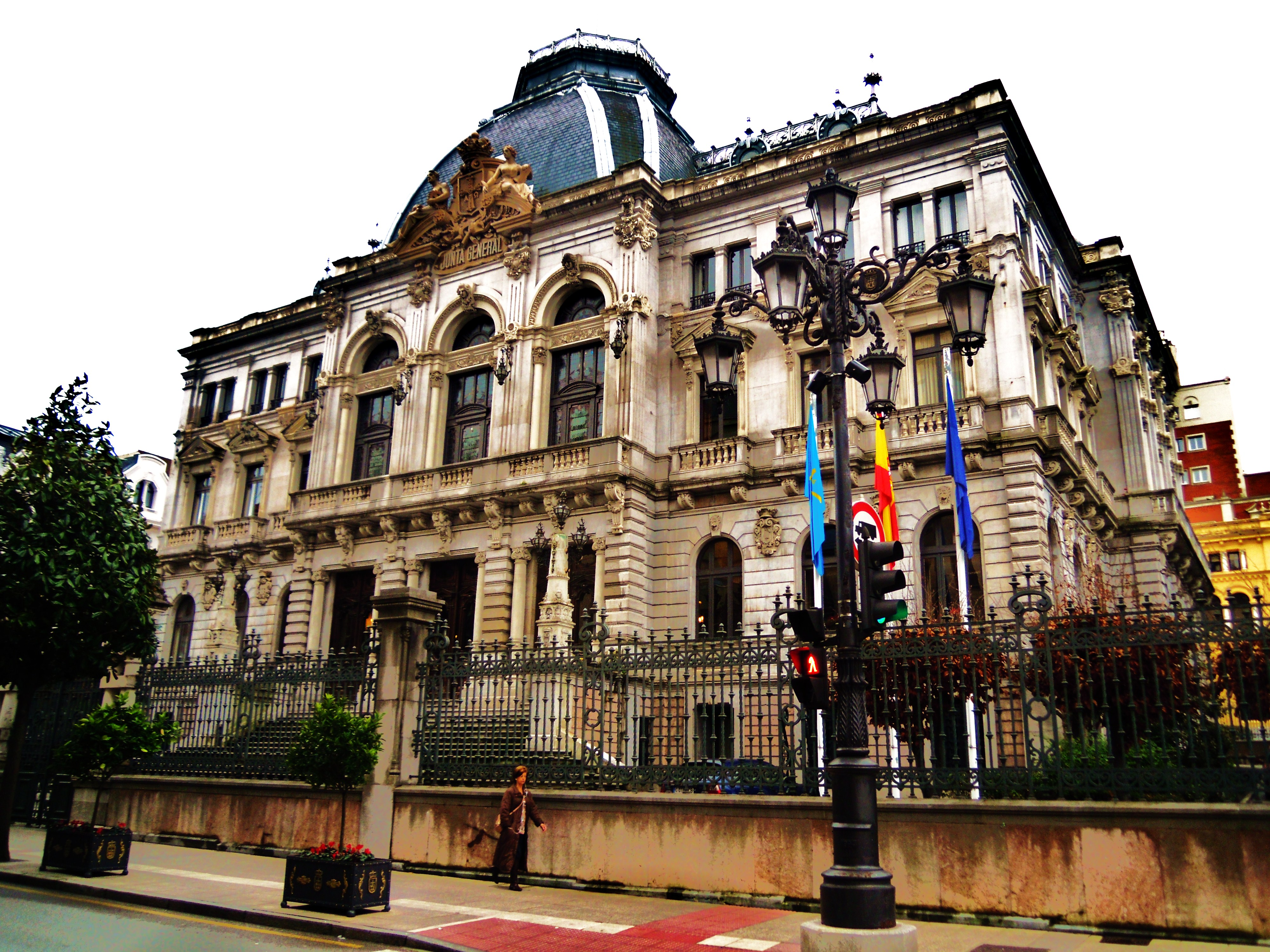 Xunta Xeneral d'Asturies